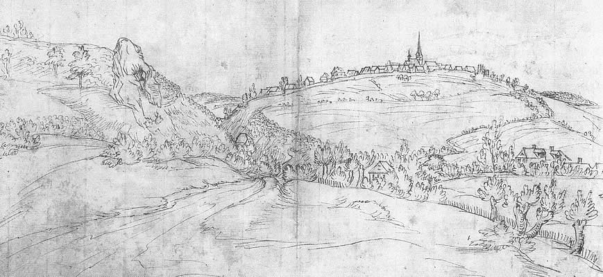 Zeichnung der Stadt Warstein, links der "Hohe Stein" mit dem markanten Felsdurchbruch